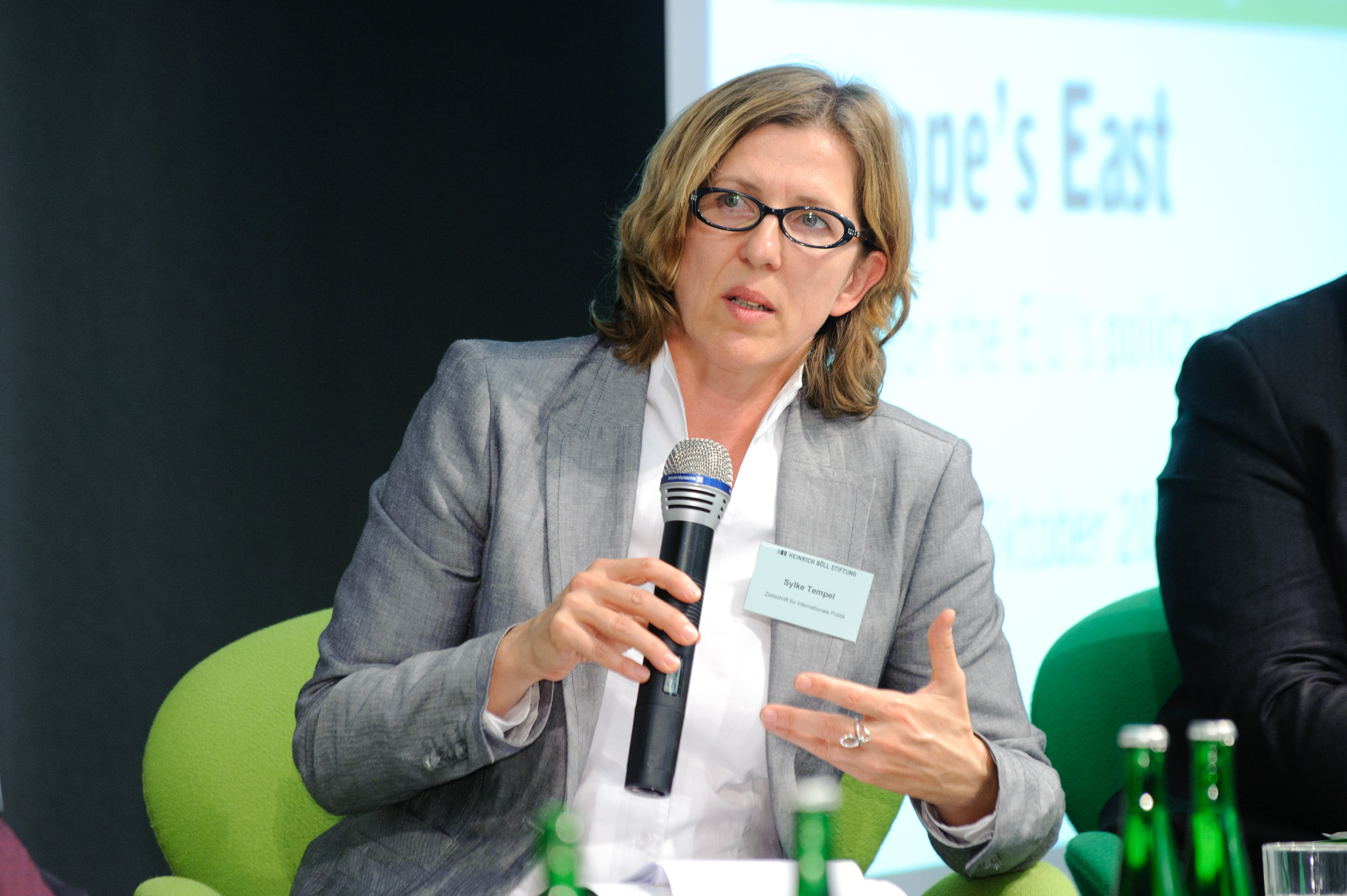 Sylke Tempel (Chefredakteurin - Zeitschrift für Internationale Politik) Foto: CC-BY-SA Stephan Röhl /